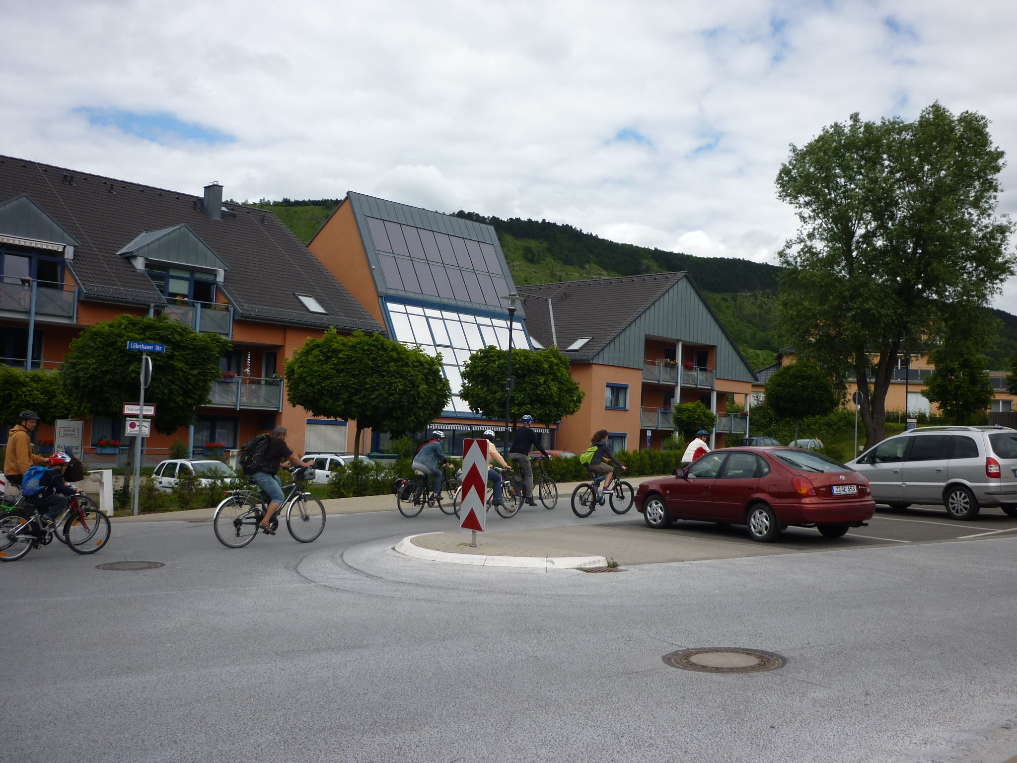 Kirchenradweg am Diakonie-Seniorenzentrum "Gertrud Schäfer Haus", Familienradfahrt zur Eröffnung des Kirchenradweges am 20. Juni 2010